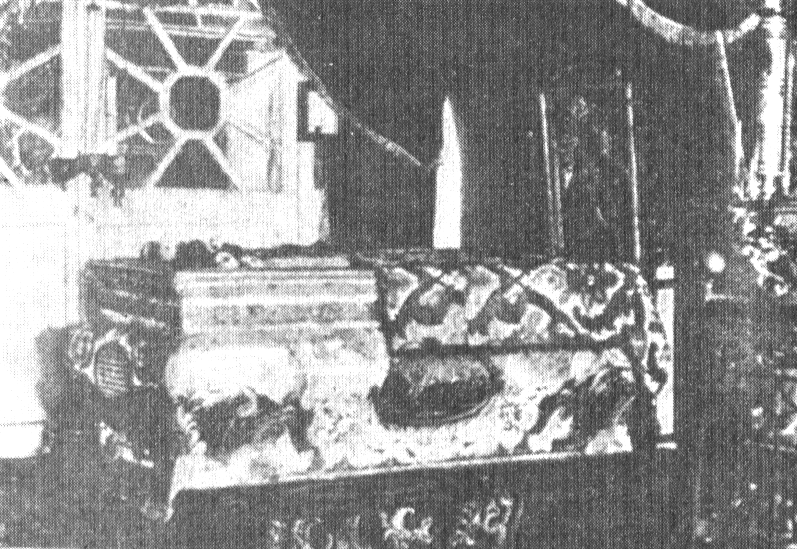 Иллюстрация книги "Православные русские обители" стр.082 илл.1